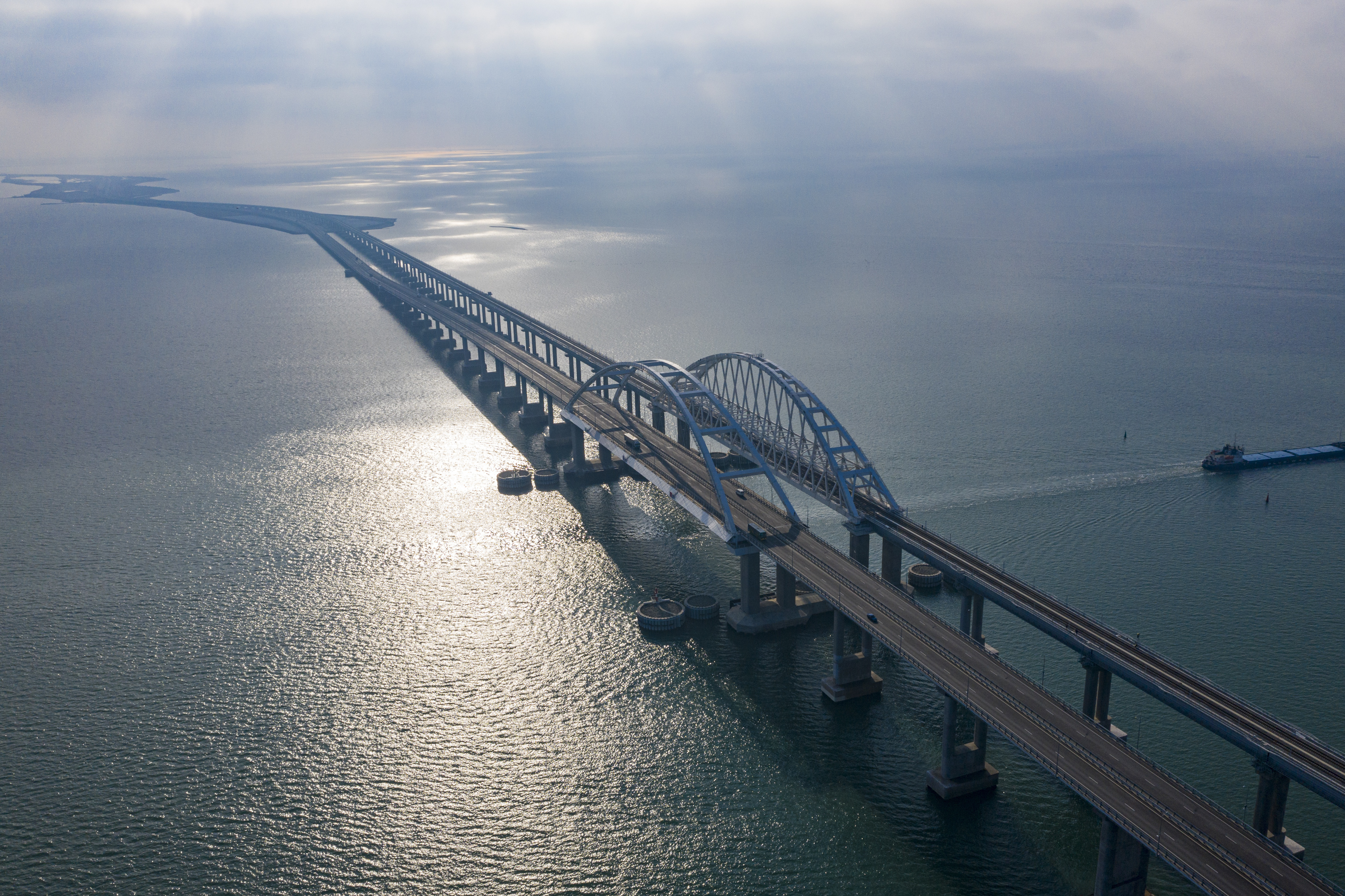 Крымский мост. 21 декабря 2019 года.